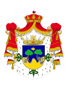 Armas de VALLES sobre cruz de Alcántara y manto de Grande de España